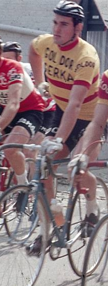 Willy Vekemans in een Belgische koers (1967)